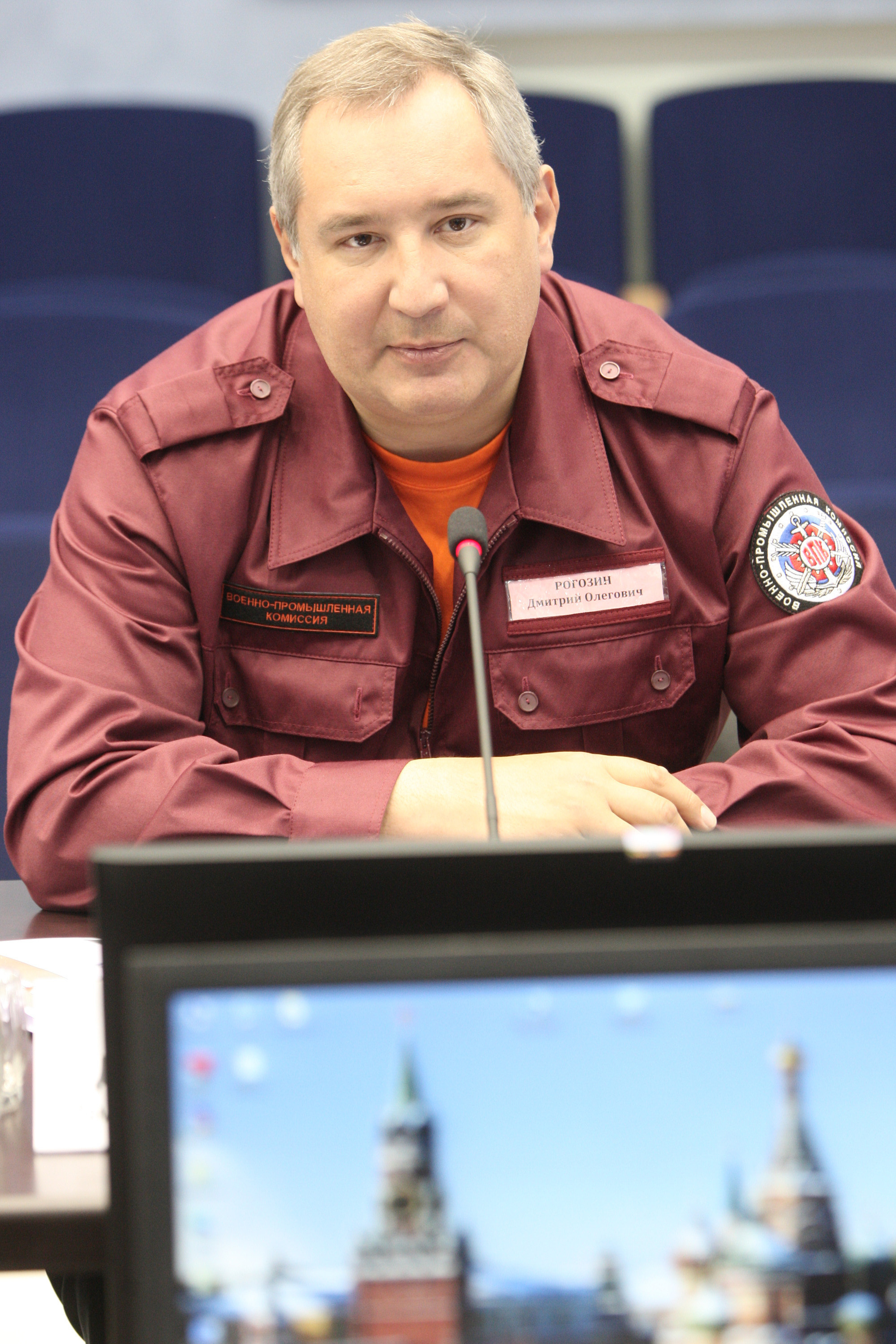 Заместитель Председателя Правительства Российской Федерации, заместитель председателя Военно-промышленной комиссии Российской Федерации, председатель коллегии Комиссии